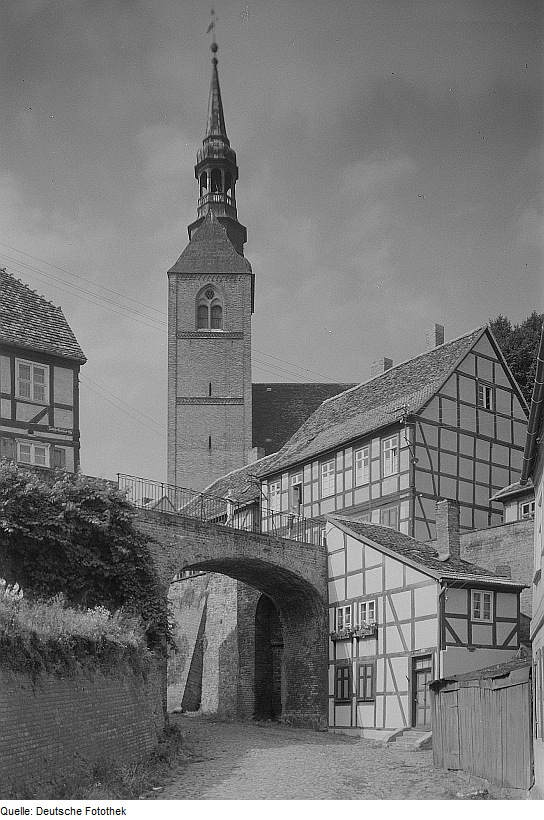 Original image description from the Deutsche Fotothek Tangermünde. Blick zur St. Stephanskirche